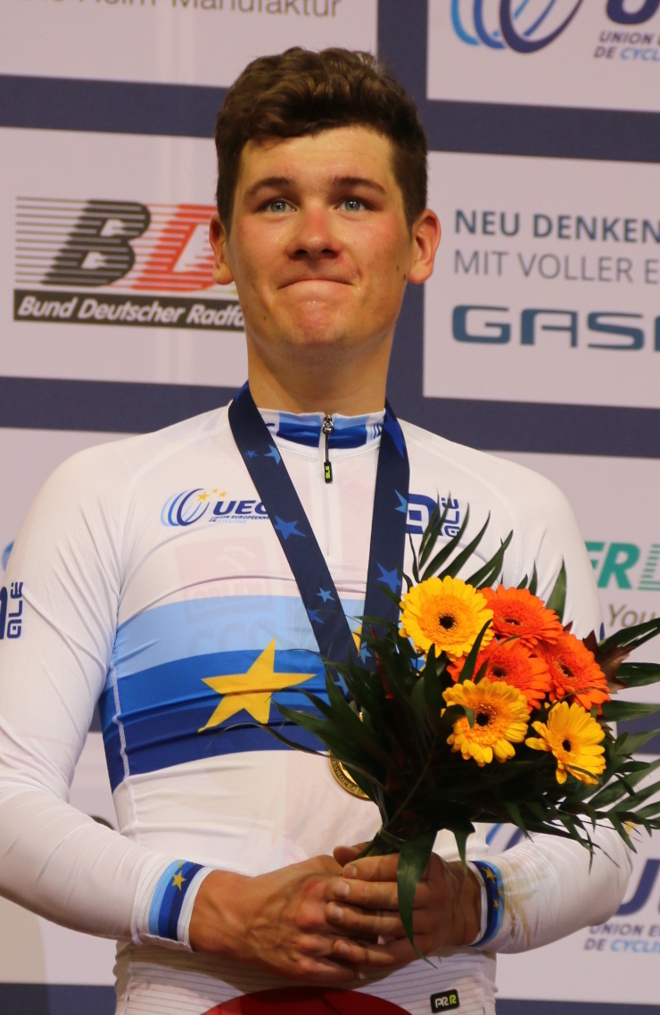 Alan Banaszek, Europameister im Punktefahren